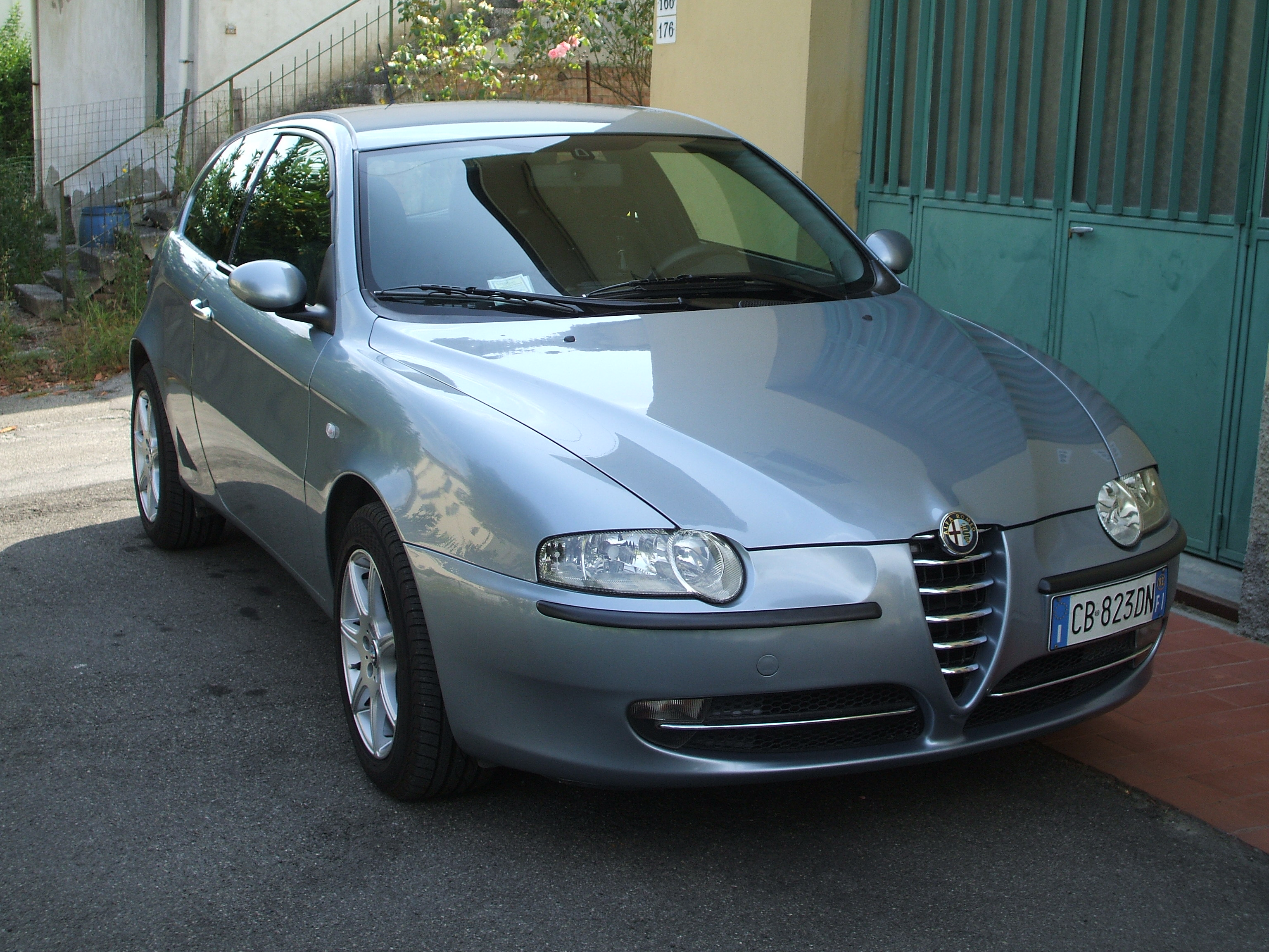 la mia macchina